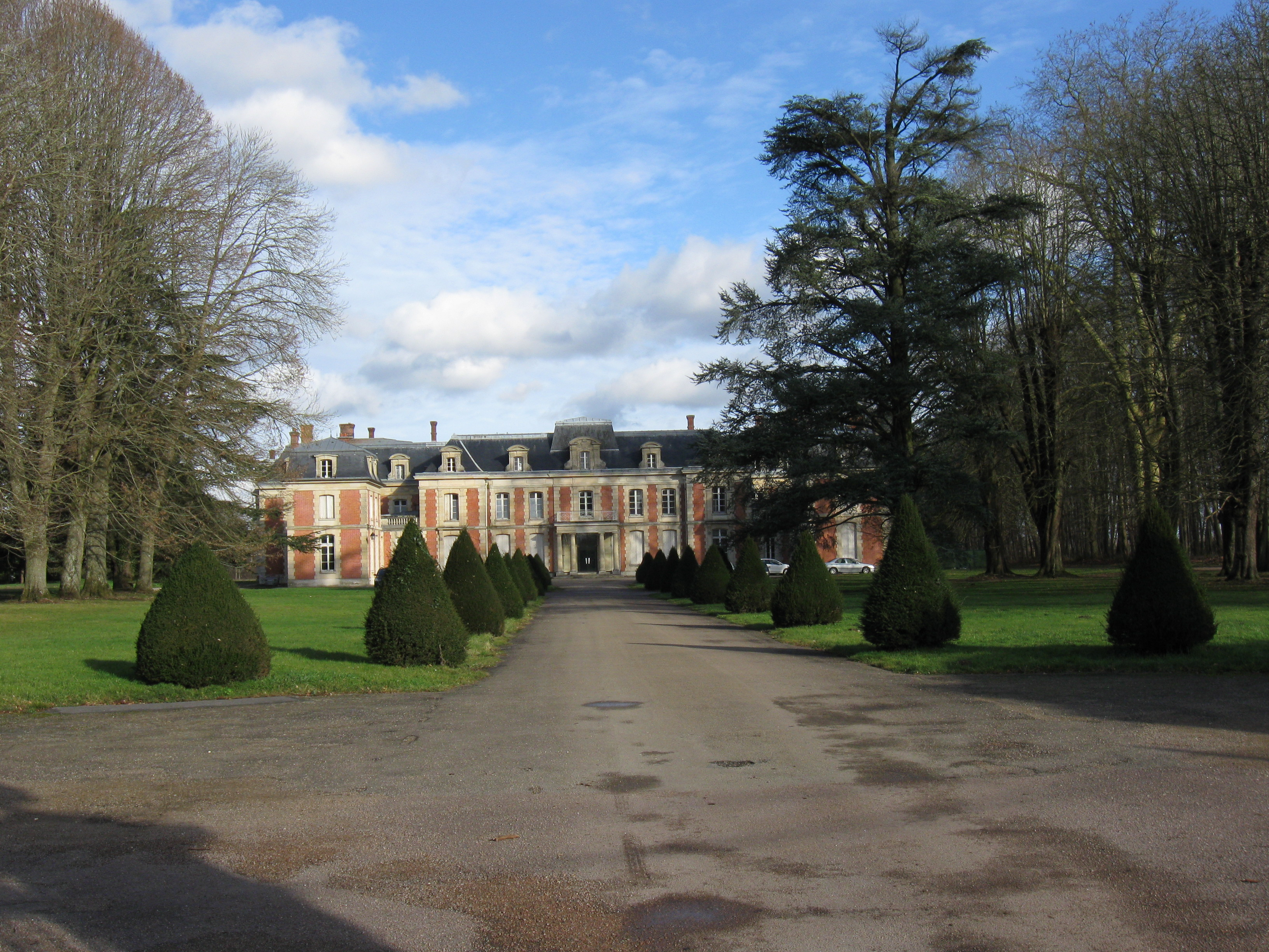 Château de Neufmoutiers-en-Brie. (Seine-et-Marne, région Île-de-France).